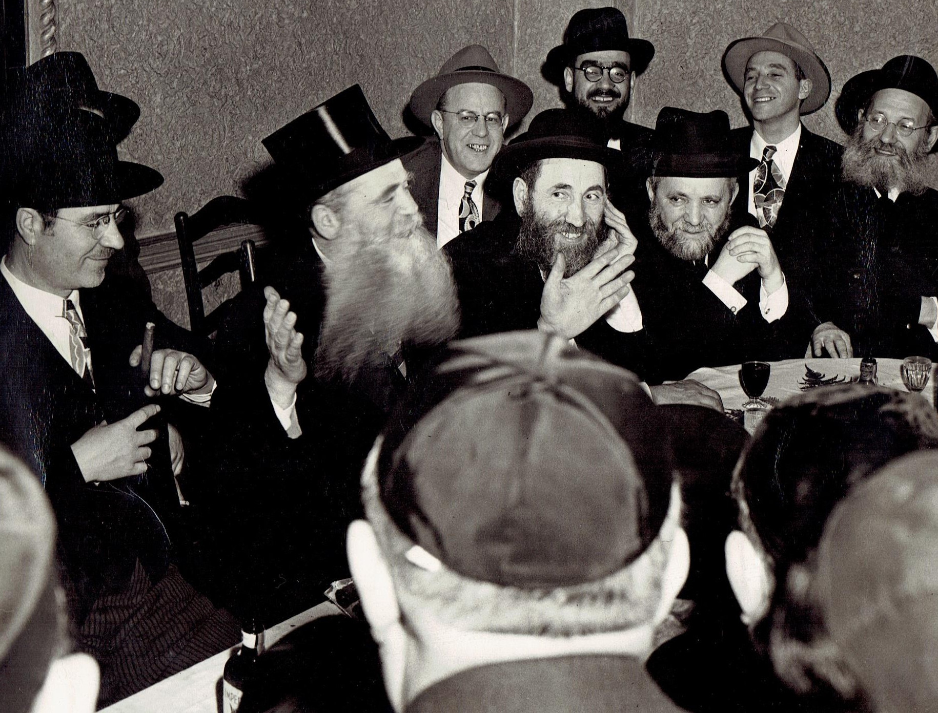 הרב צבי הירש דאכאוויטץ עם חברים בשמחה של מצוה